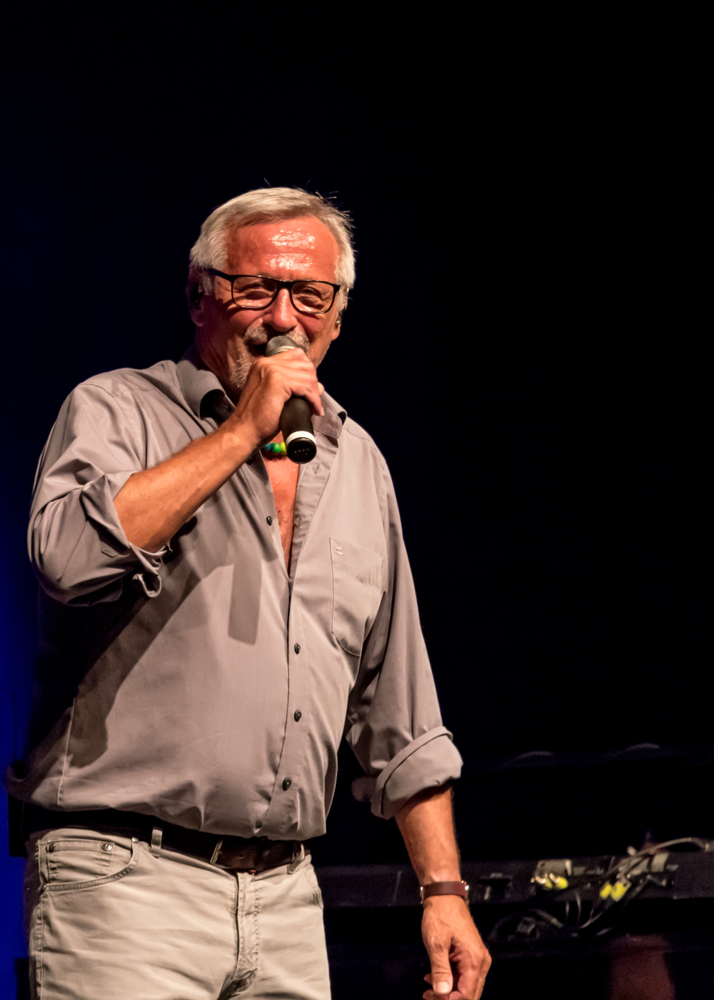 Bilder vom Zelt Musik Festival 2017 in Freiburg im Breisgau Konstantin Wecker (ZMF 2017) am 17.07.2017